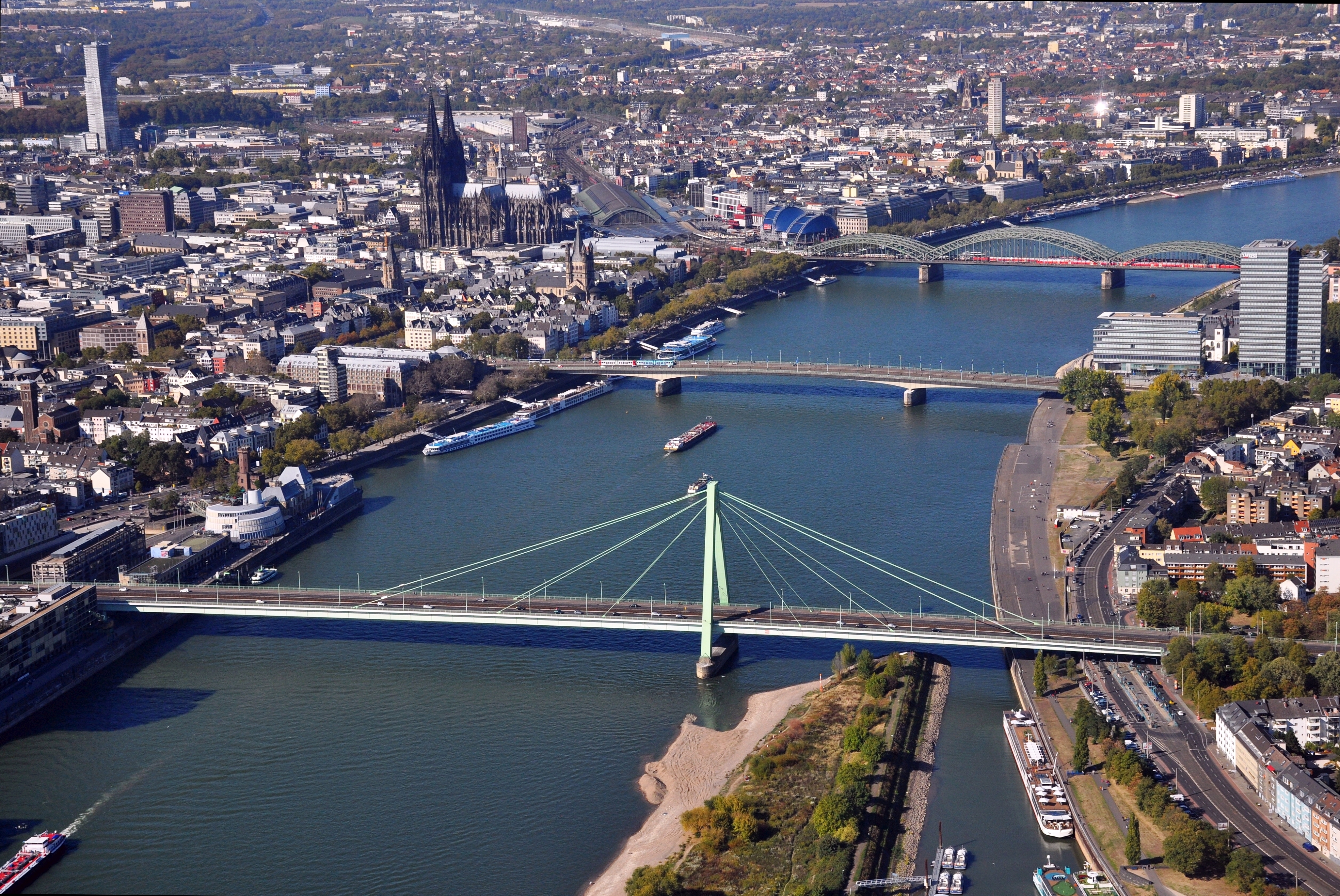 Köln – Rheinbrücken. Von vorne nach hinten: Severinsbrücke, Deutzer Brücke, Hohnezollernbrücke